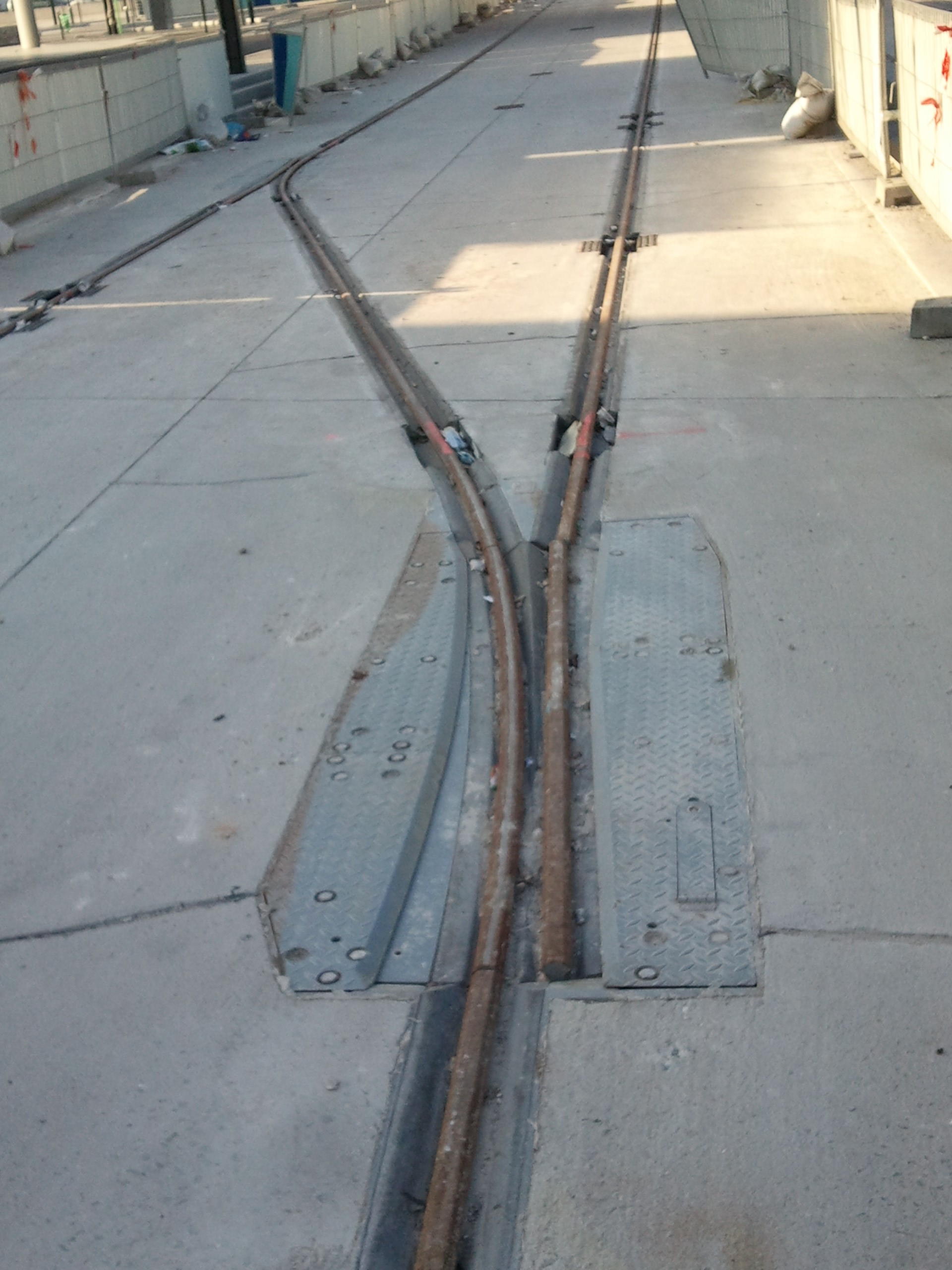 Aiguillage du système de tramway sur pneus Translohr, implanté à Pierrefitte sur la ligne 5 du Tramway d'Île de France